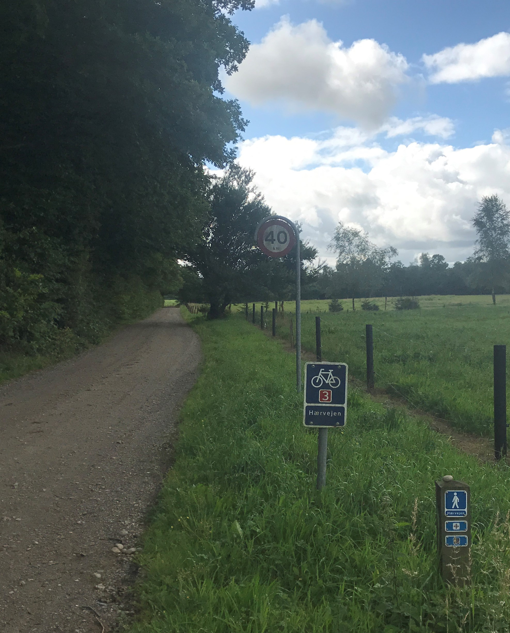 El Camino del Ejército (Haervejen) poco antes de Kollemorten